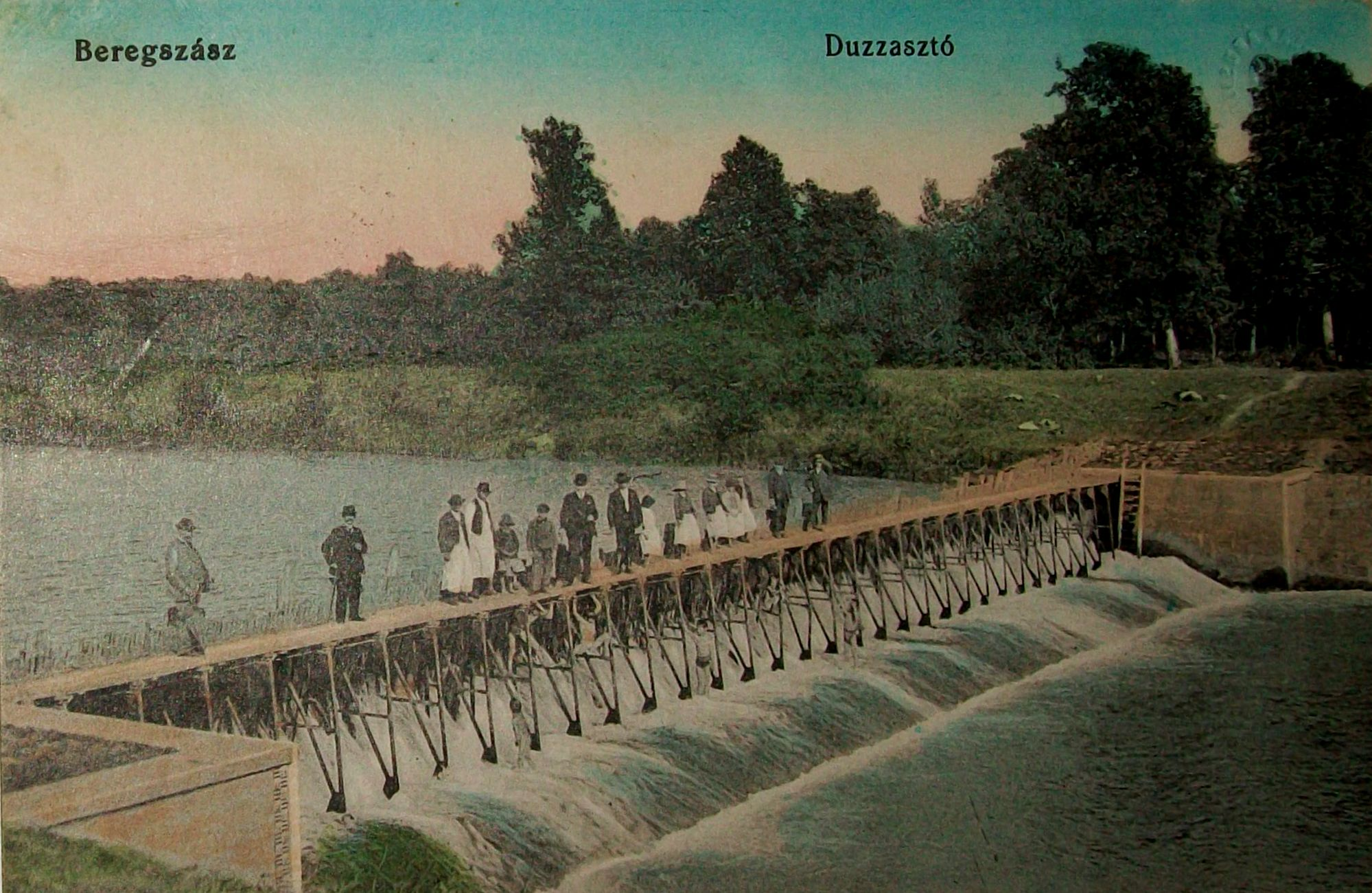 Képeslap - Beregszász duzzasztó 1900 körül.